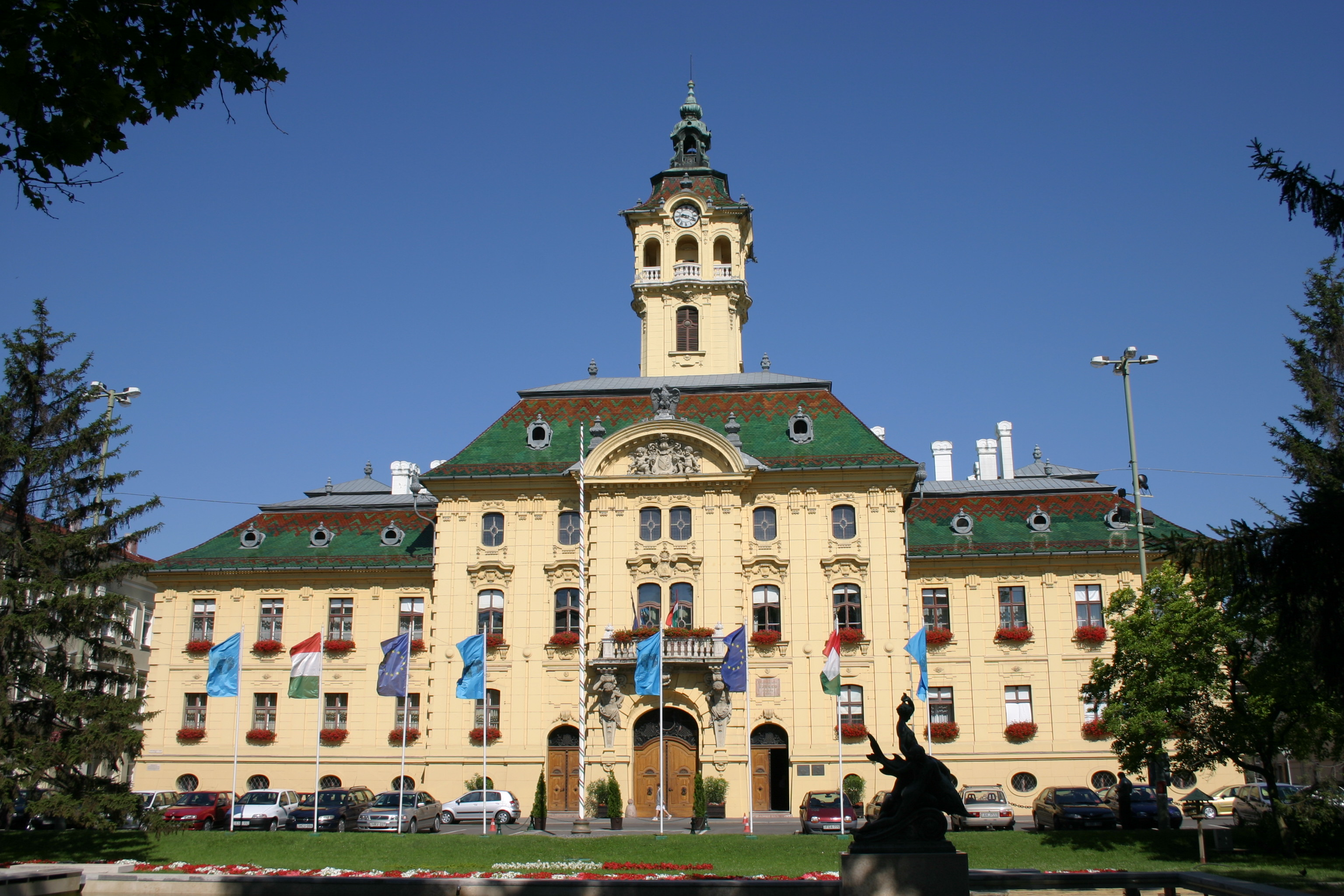 Városháza, Szeged (eredeti formájában 1799–1805 között emelték, Vedres István tervei alapján. A nagy árvizet követően Lechner Ödön és Pártos Gyula tervei alapján 1883-ban eklektikus, neobarokk stílusban átalakították)